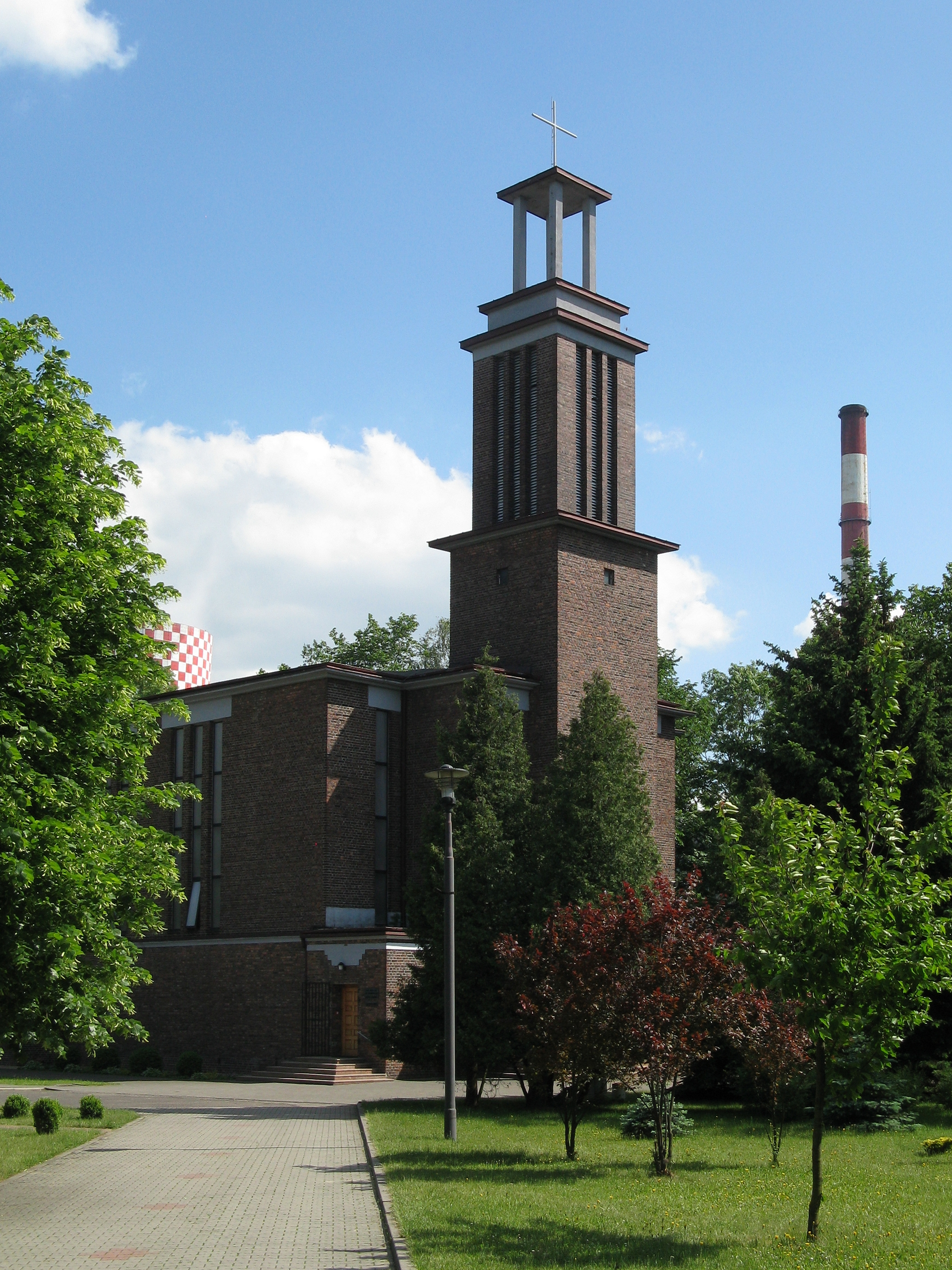 Kościół Niepokalanego Poczęcia NMP w Będzinie– Łagiszy.